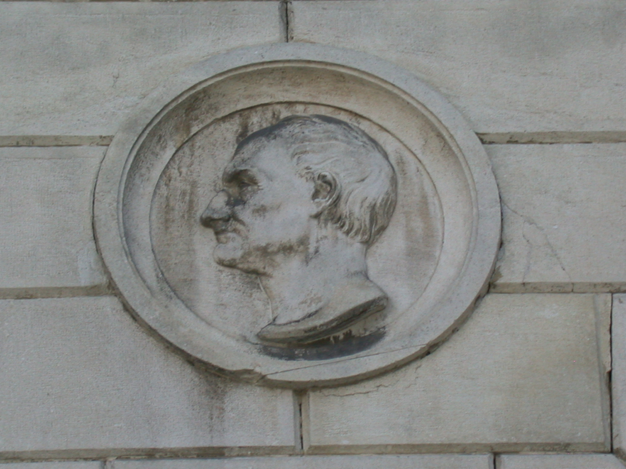 Ritratto di Teodoro Bonatti (ingegnere italiano) al Palazzo San Crispino a Ferrara